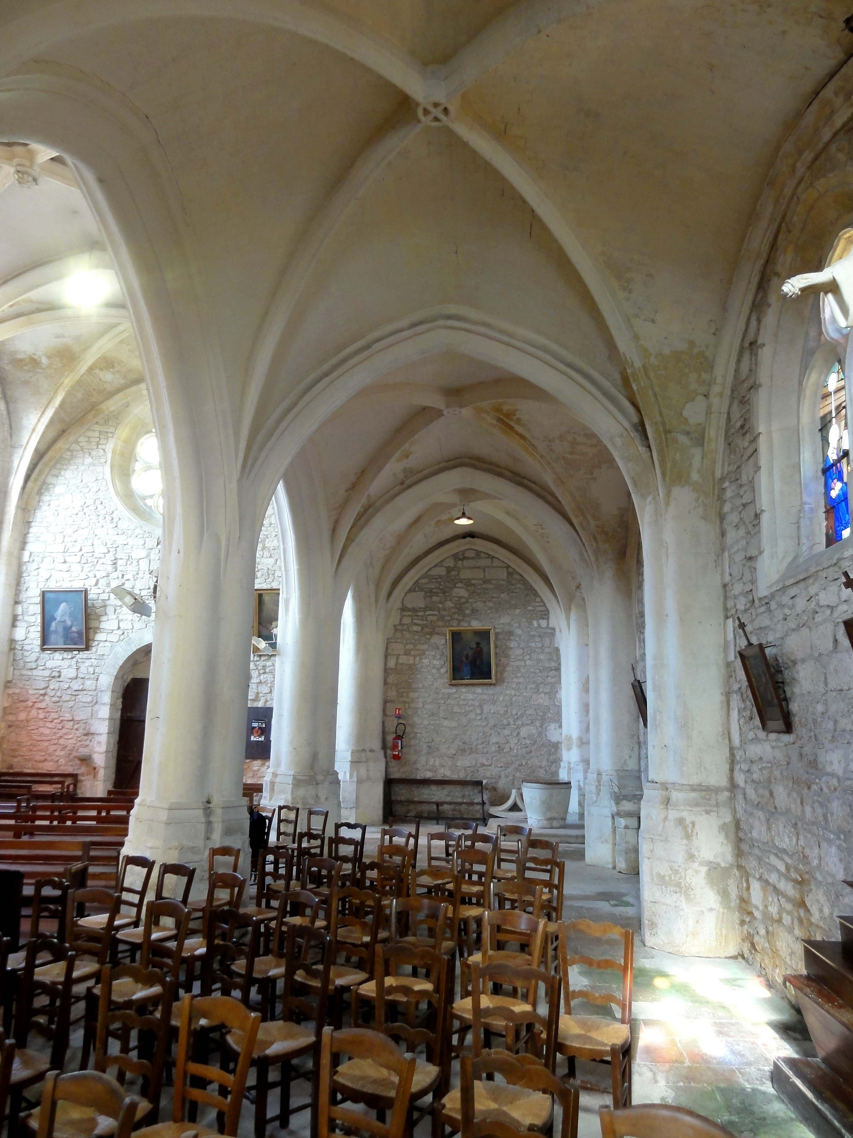 Intérieur de l'église (voir titre).